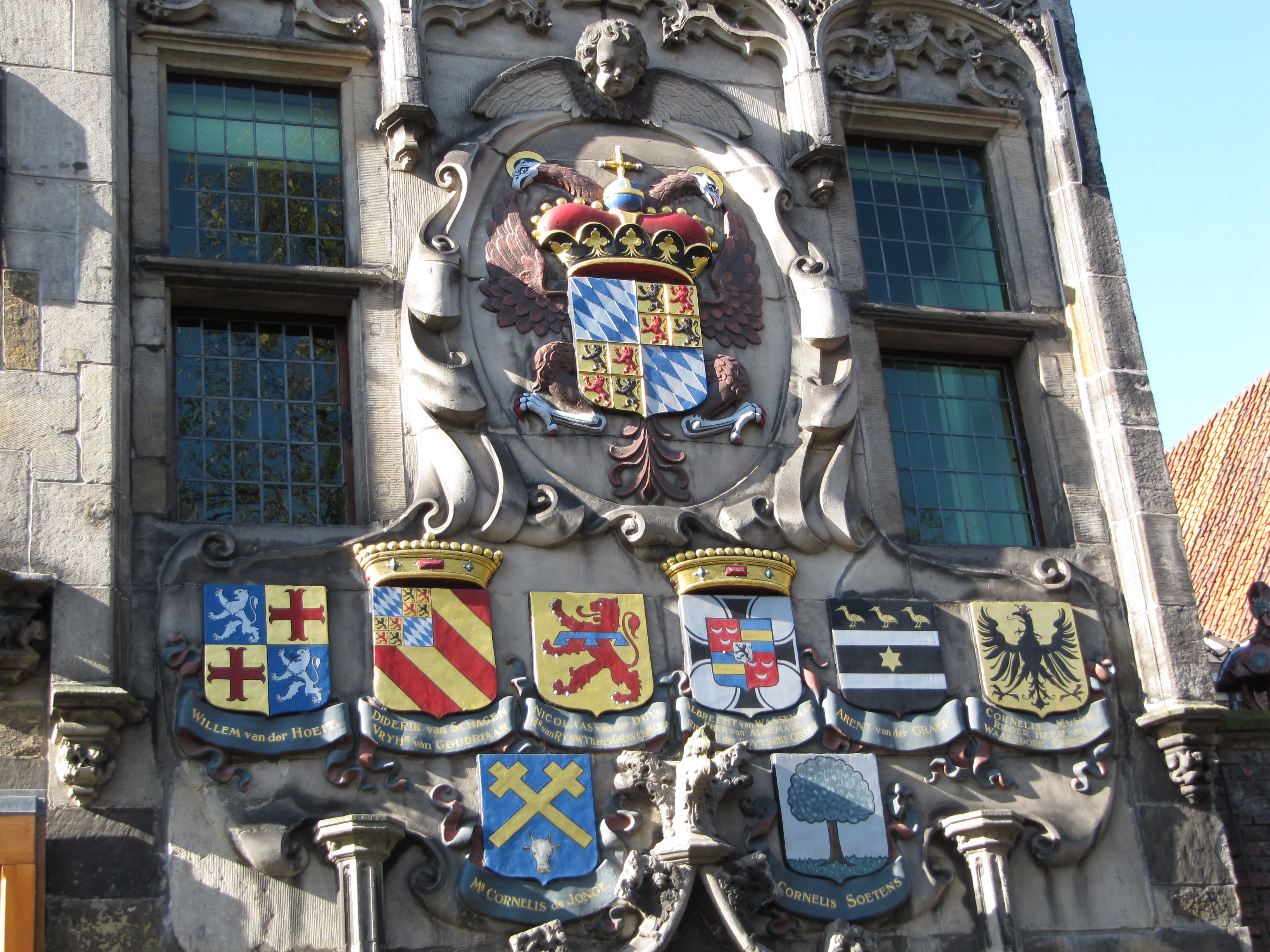 Oude Delft 167 (detail2)